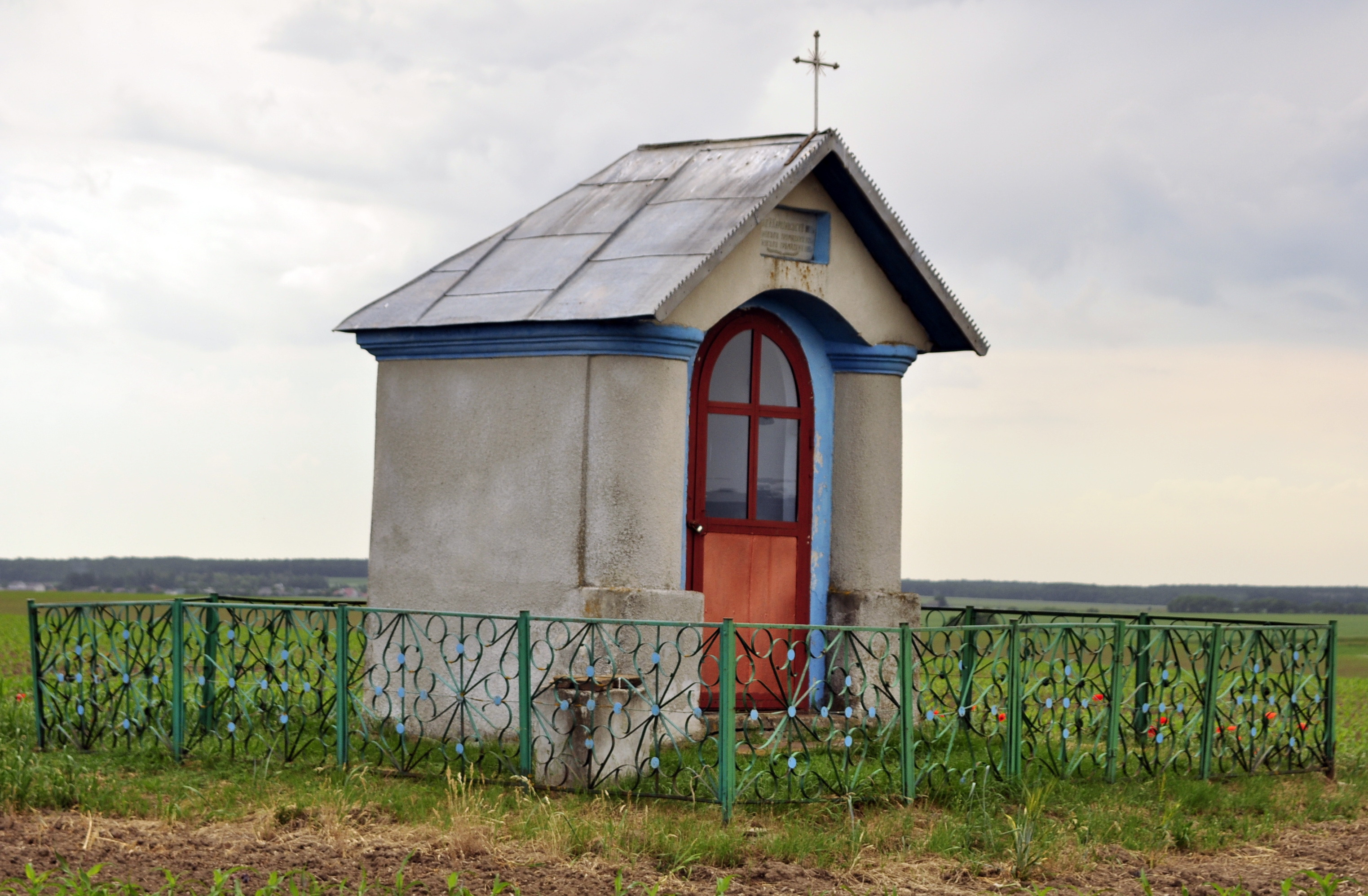 Каплиця